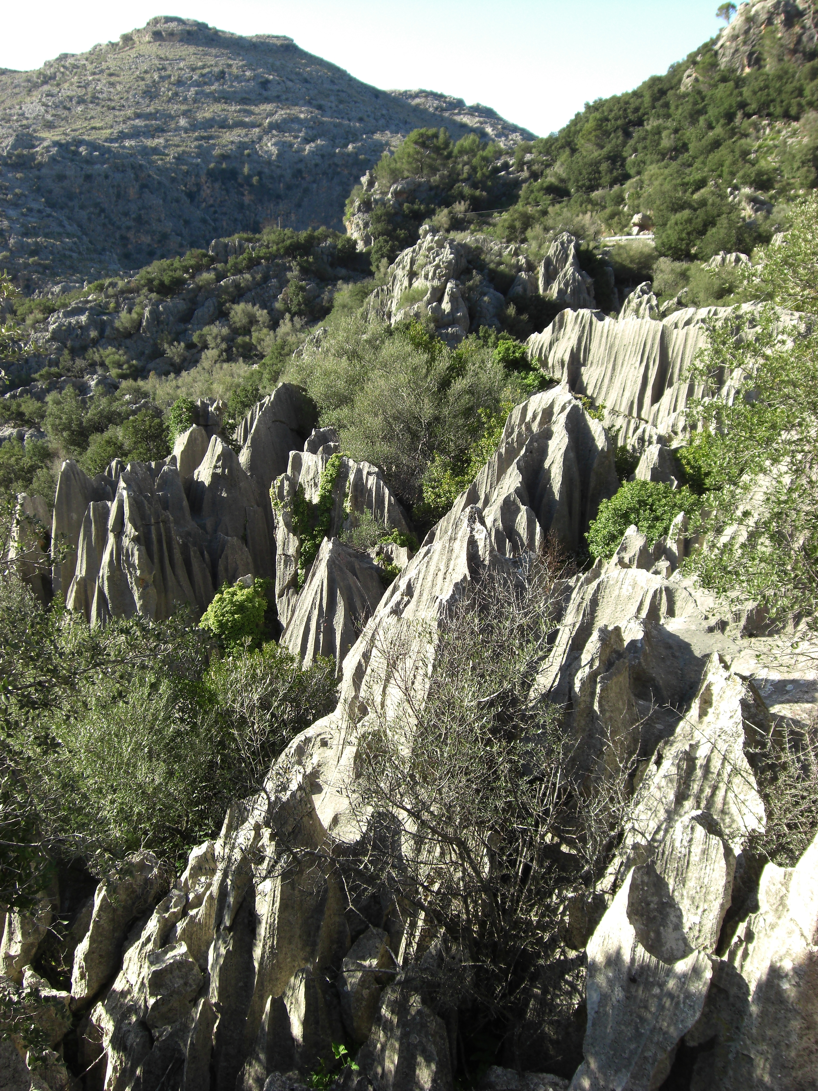 Rocas misteriosas, Mallorca